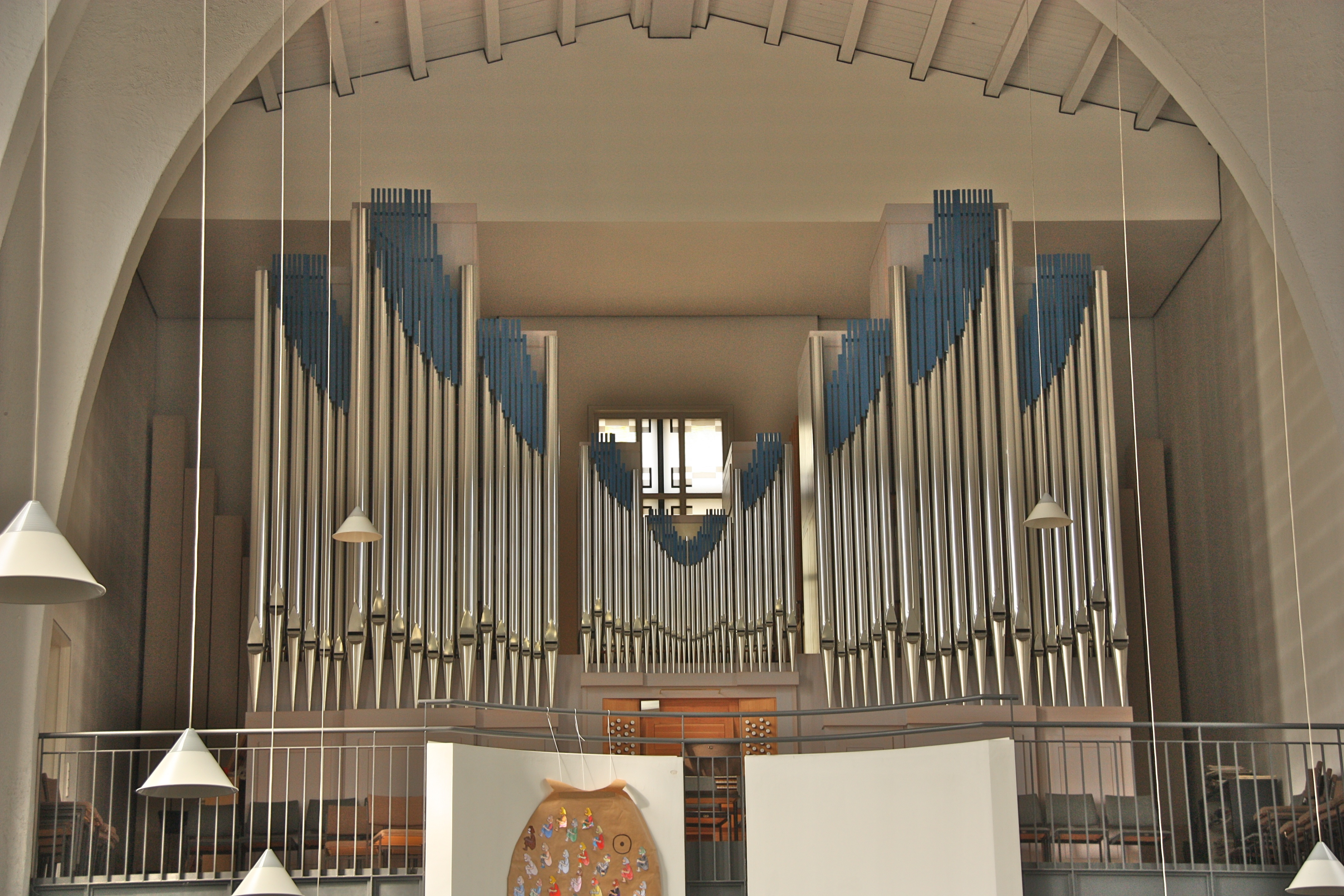 Hamburg, Volksdorf, Kirche am Rockenhof, Orgelprospekt, Mühleisen-Orgel, 2002